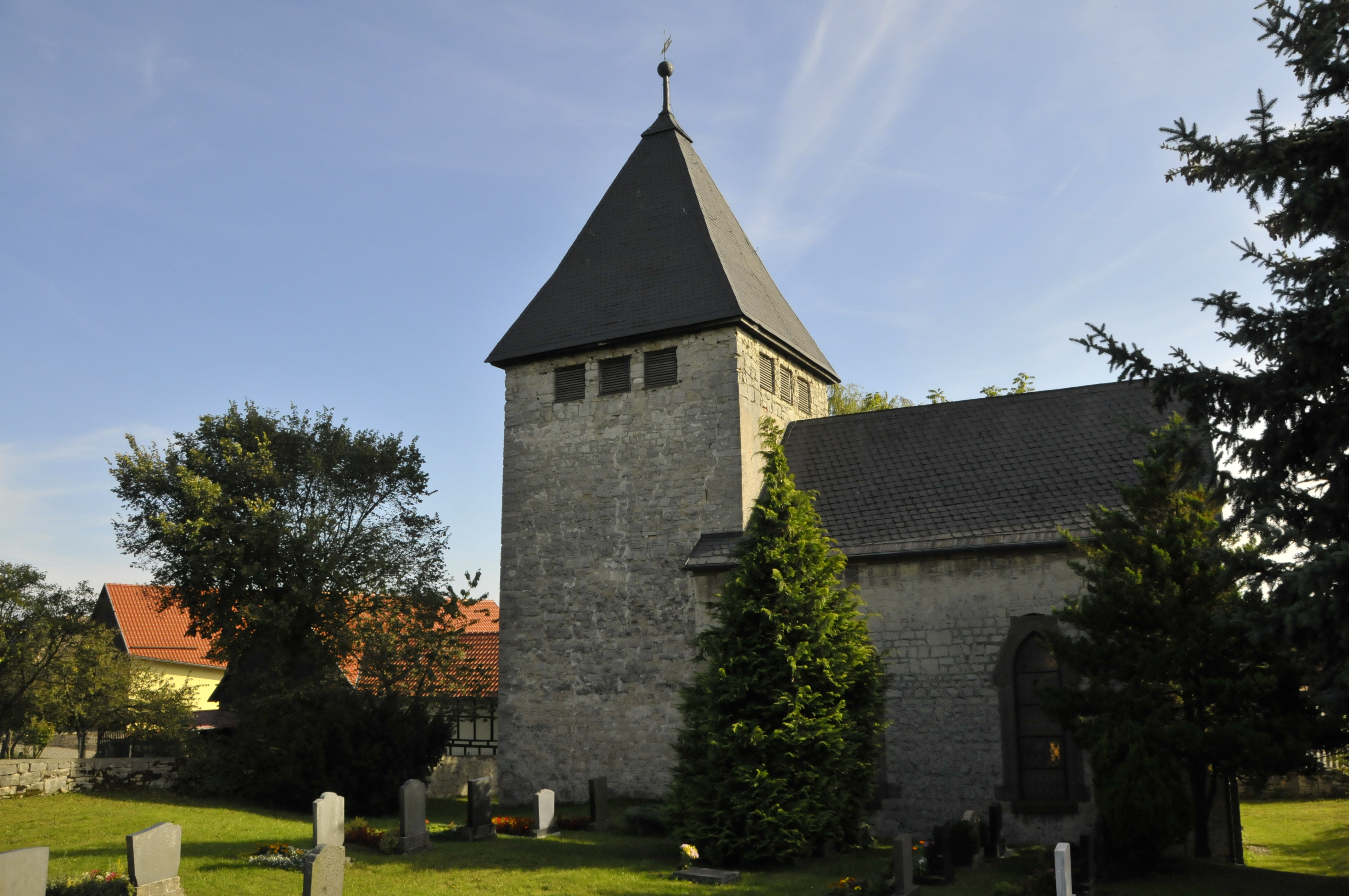 Meckfeld (Blankenhain), Kirche